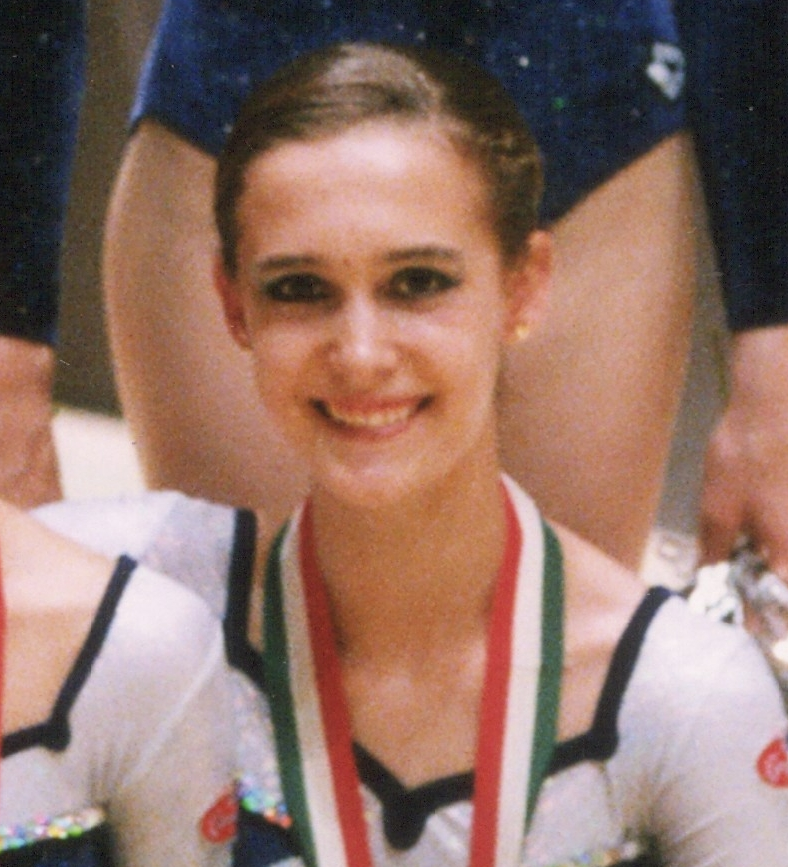 Marta Calamonte en 1999 con la medalla de bronce en el Europeo de Budapest.